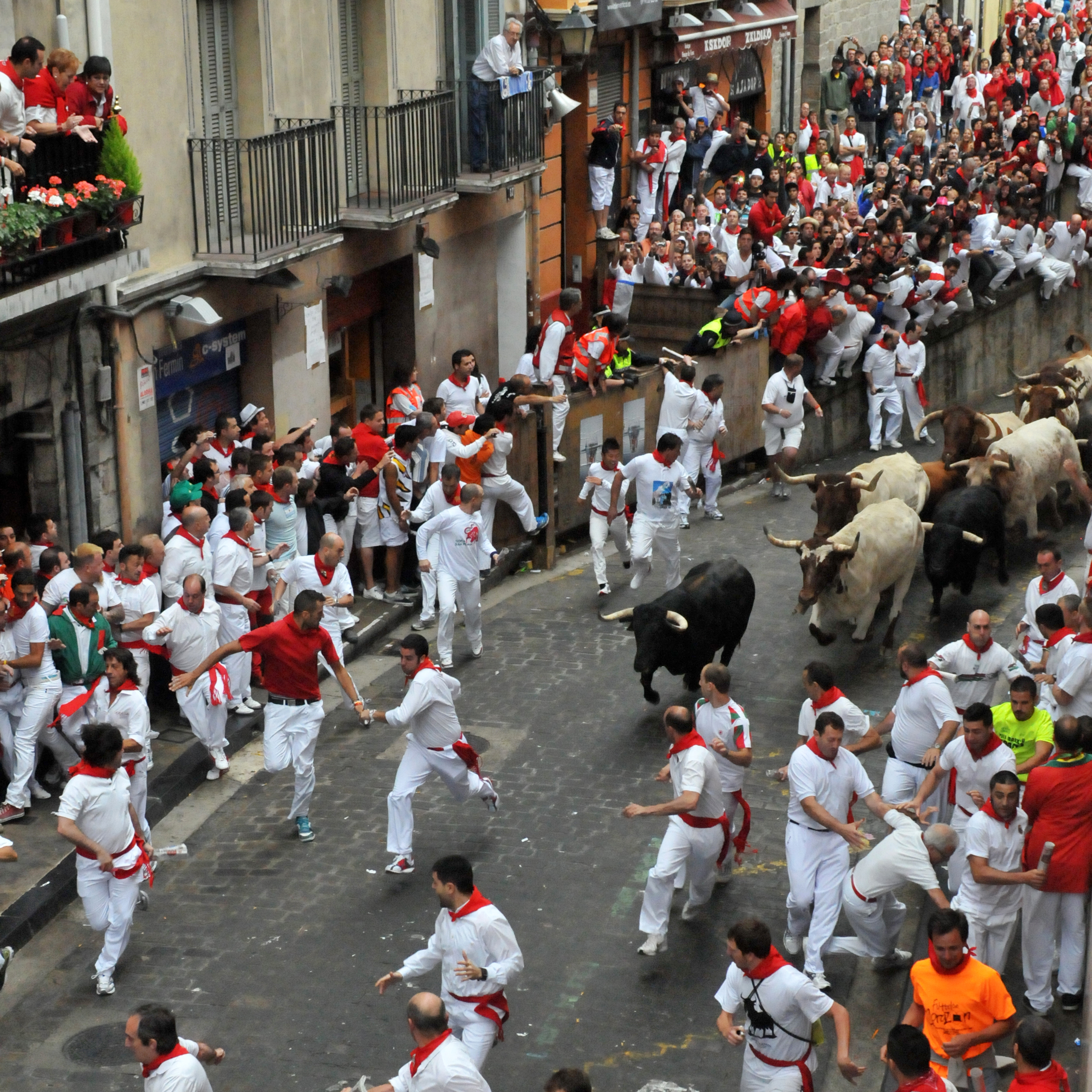 Corriendo un encierro en San Fermines 2014, Pamplona-Iruña